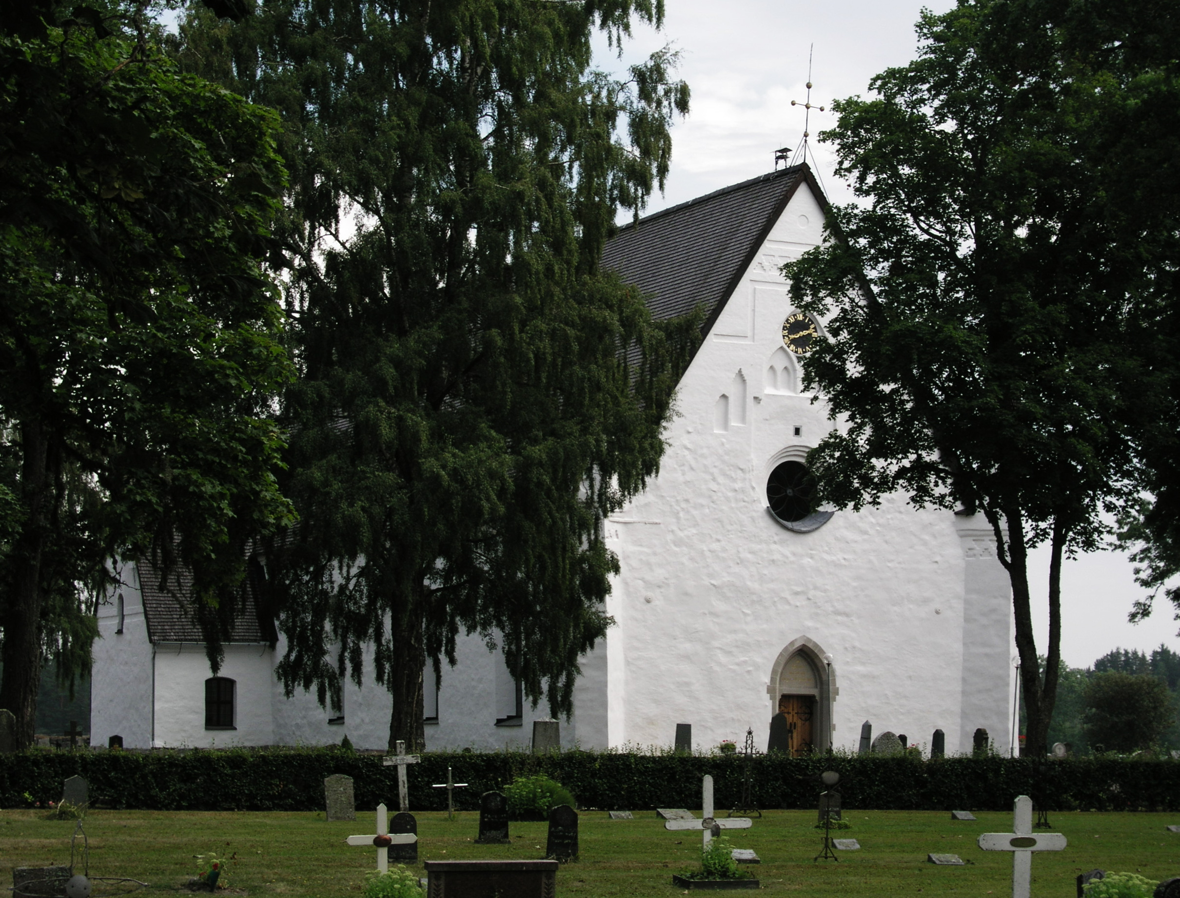 Tierps kyrka/church. View.